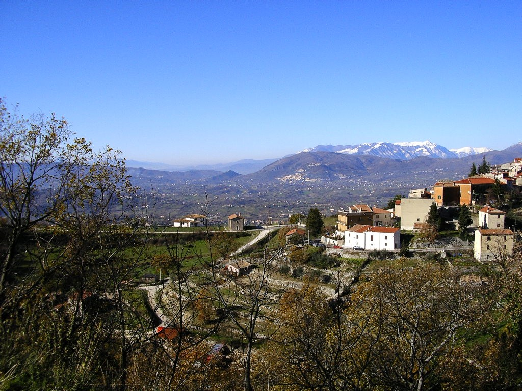 autore=Cominensis fonte=album personale data=gennaio 2005 descrizione=Scorcio della Valle di Comino vista da Settefrati - Sullo sfondo il castello di Vicalvi, l'abitato di Alvito e i monti della Marsica licenza d'uso=pubblico dominio